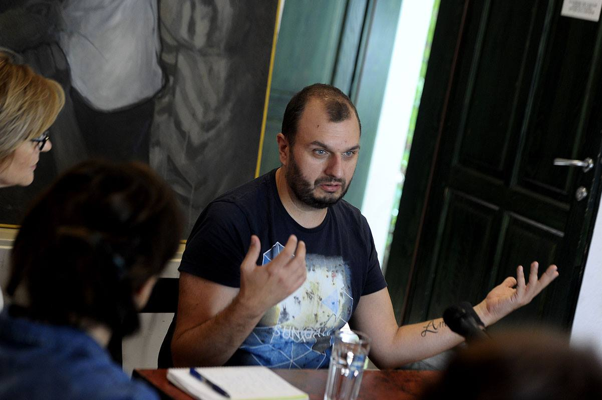 Aktivist serb, Boban Stojanović